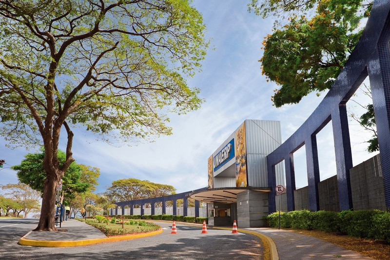 Fachada da entrada principal do campus da Unaerp Ribeirão Preto